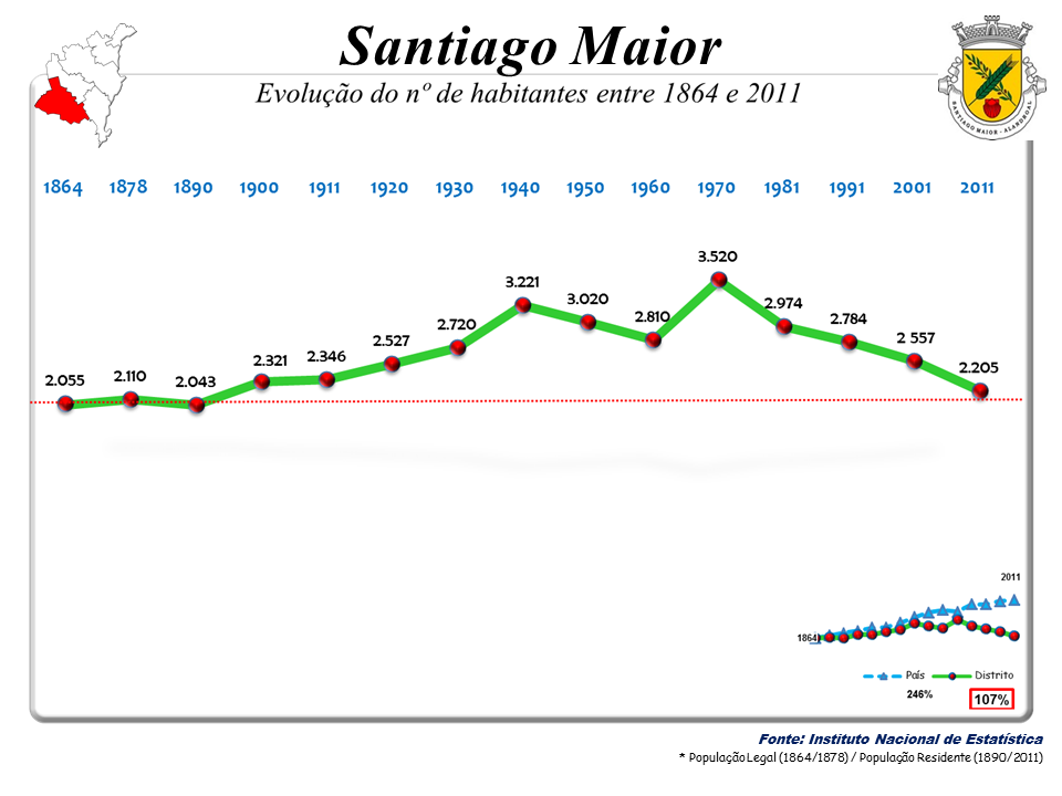 Censos 1864/2011